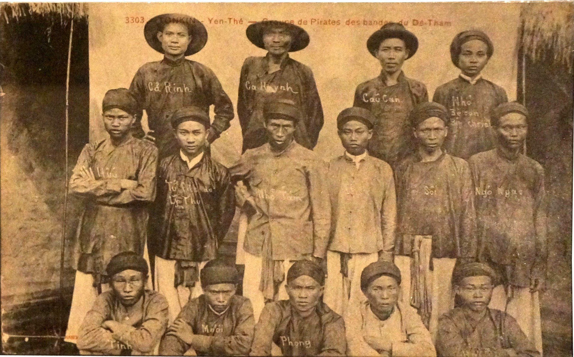 Lors de l'exposition Indochine des territoires et des hommes 1856 1956.